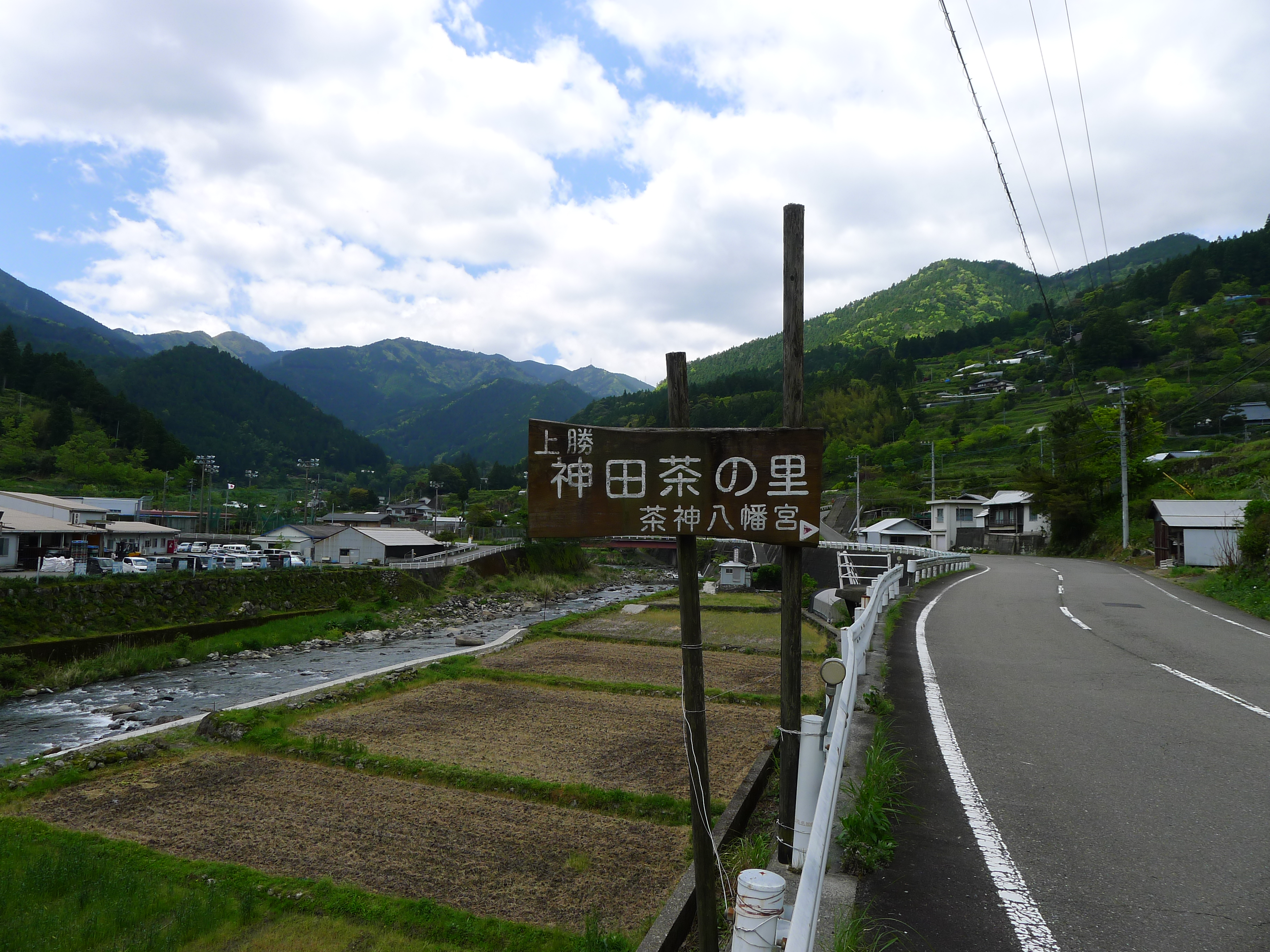 阿波番茶の産地・神田(じでん)：徳島県上勝町